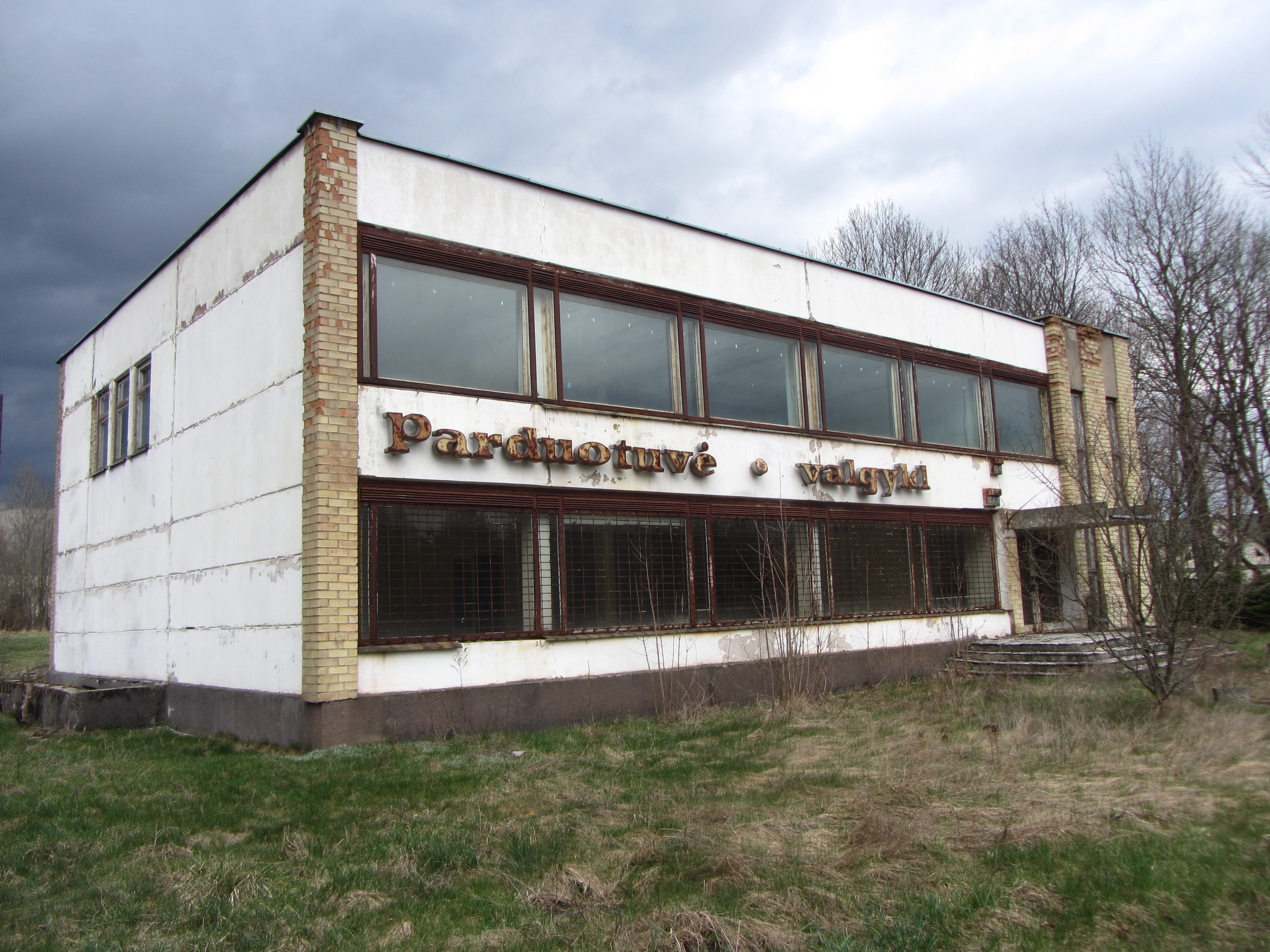 Žaugėdai, Lithuania